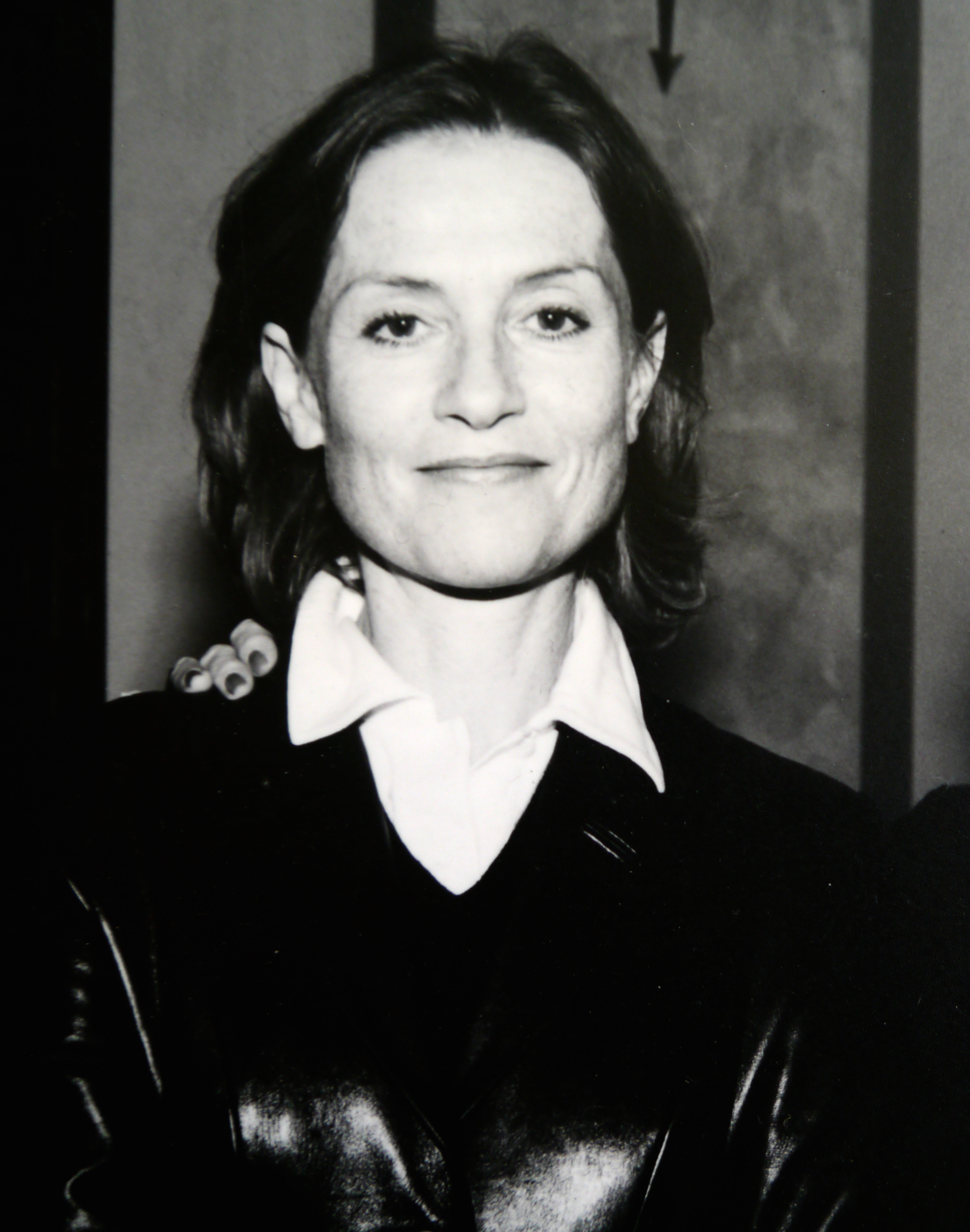 Isabelle Huppert, invitée de CINEMANIA en 1998 et 2014.